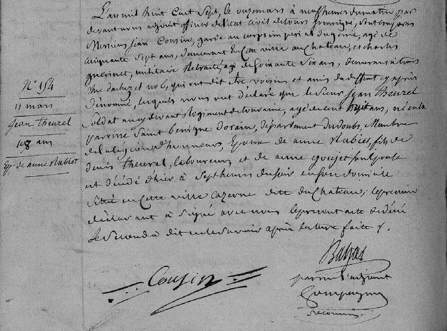 Acte de décès de Jean Thurel - Mairie de Tours (10 mars 1807)